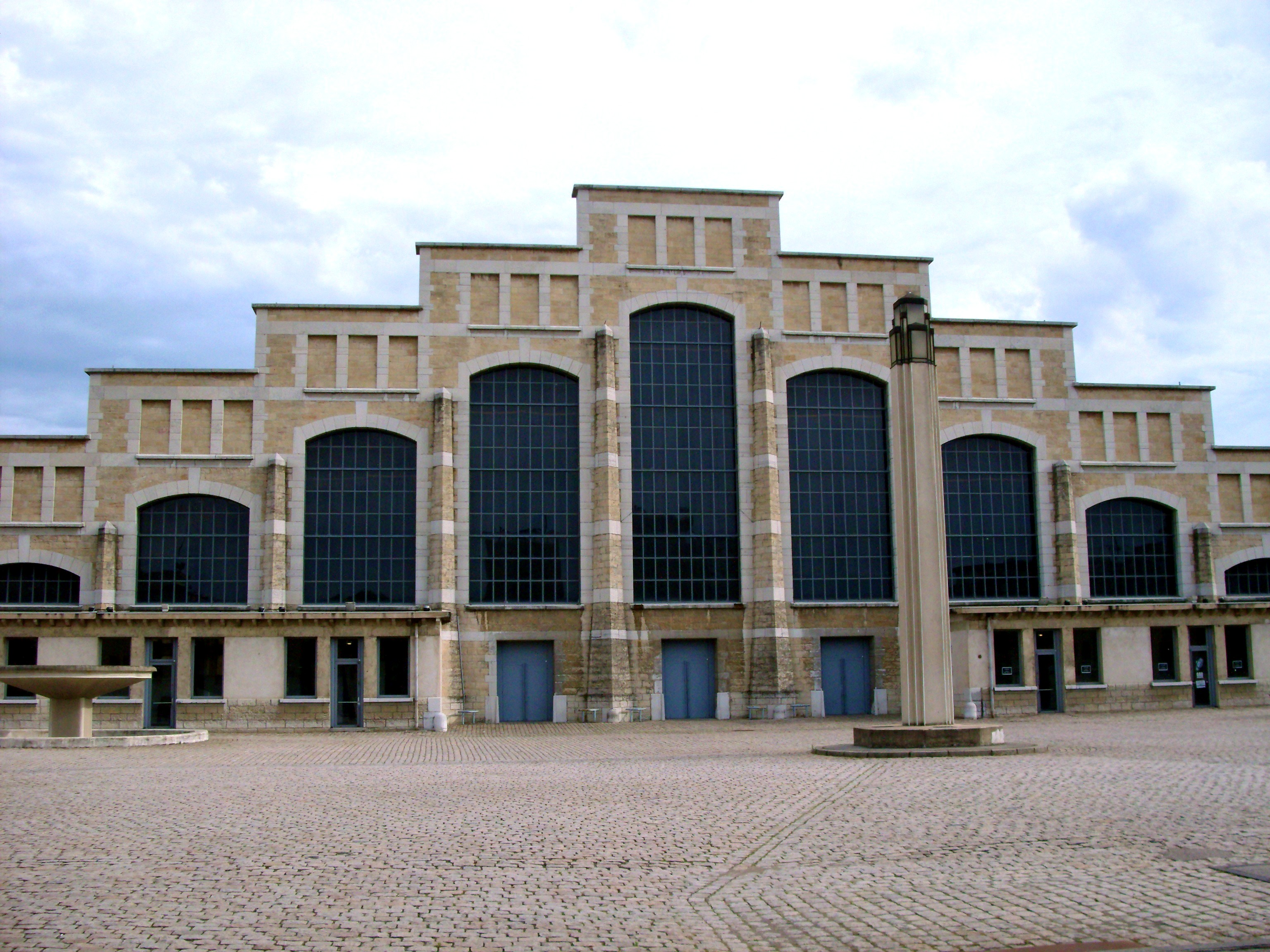 La halle Tony Garnier a été construite au début du 20ème Siècle. Elle est actuellement utilisée pour les grands concerts. C'est la plus grande surface couverte sans pilier du monde.